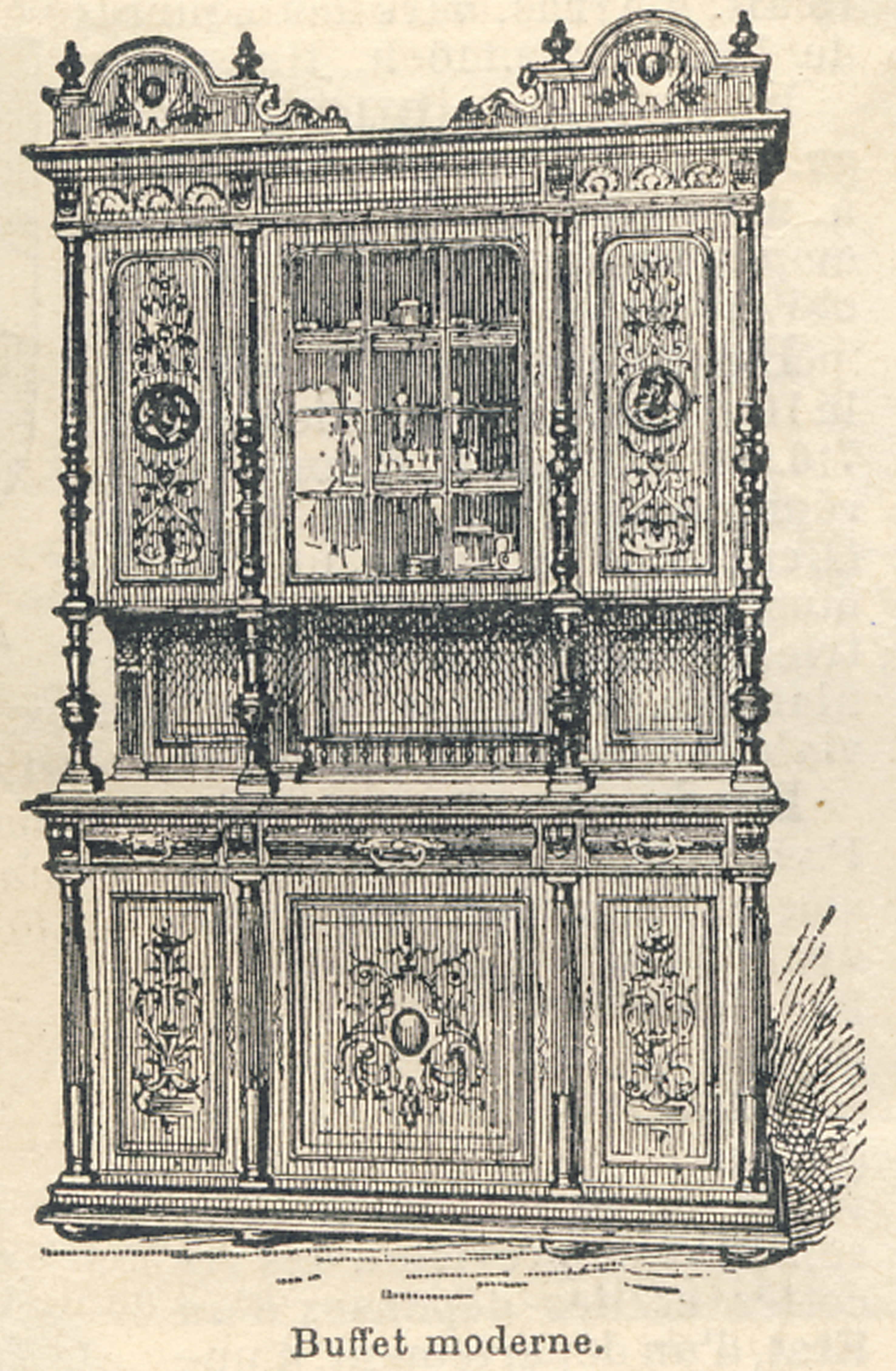 Buffet Henri II, dans le dictionnaire Larousse, vers 1905